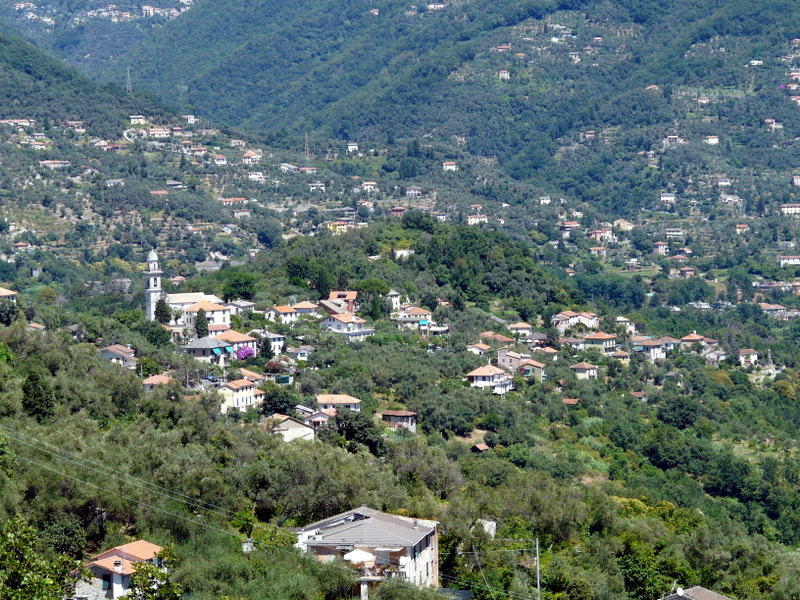 Panorama della frazione di San Massimo, Rapallo, Liguria, Italia